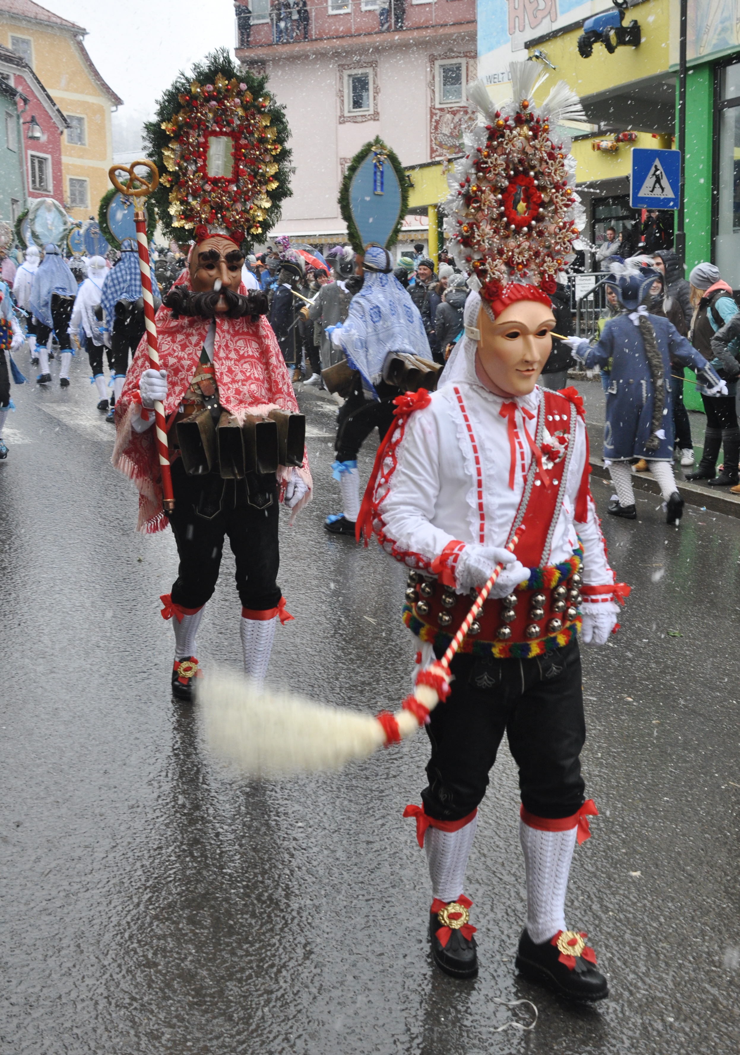 Imst (Tirol), Imster Schemenlaufen 2016, Roller und Scheller